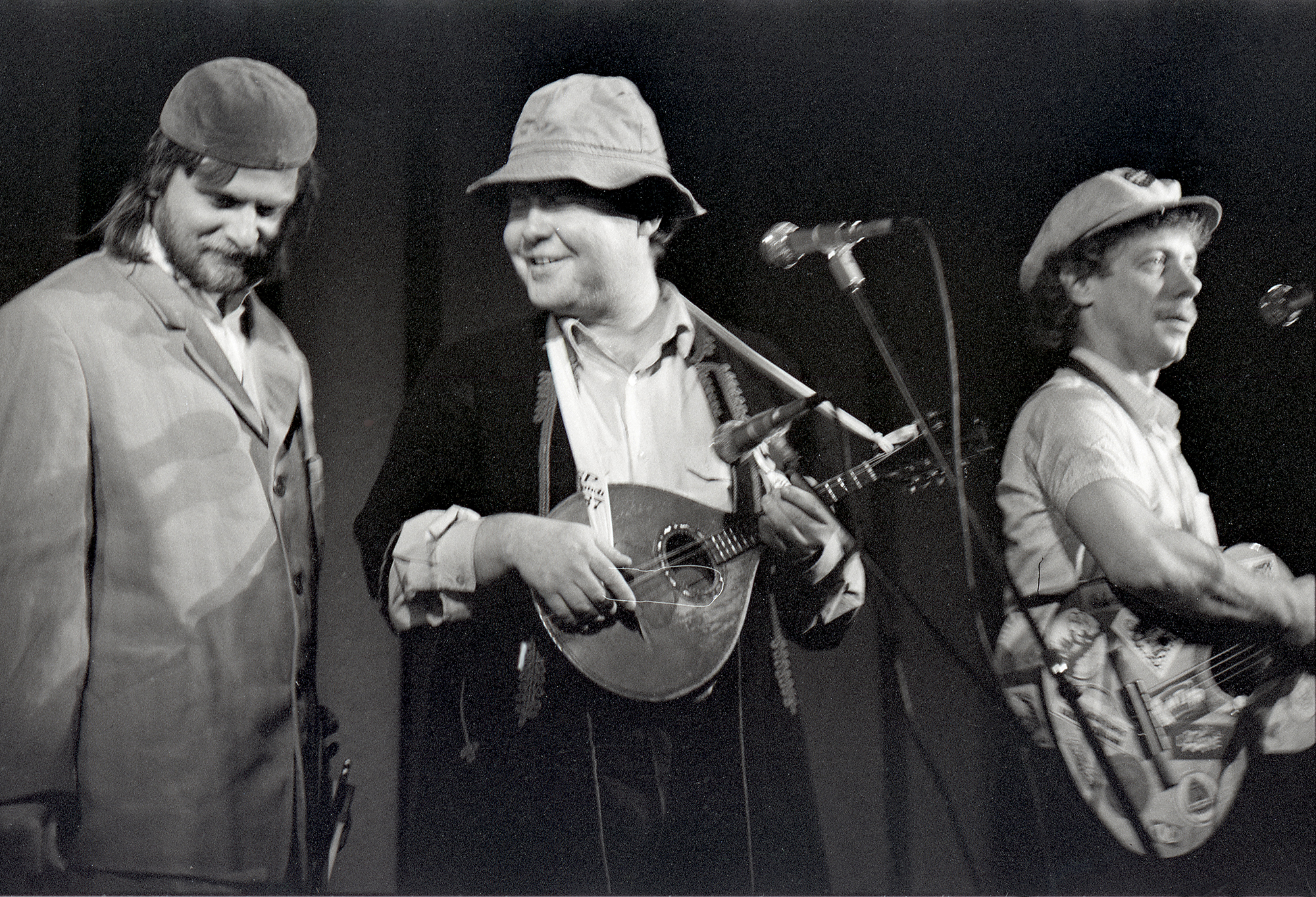 Kuldne Trio